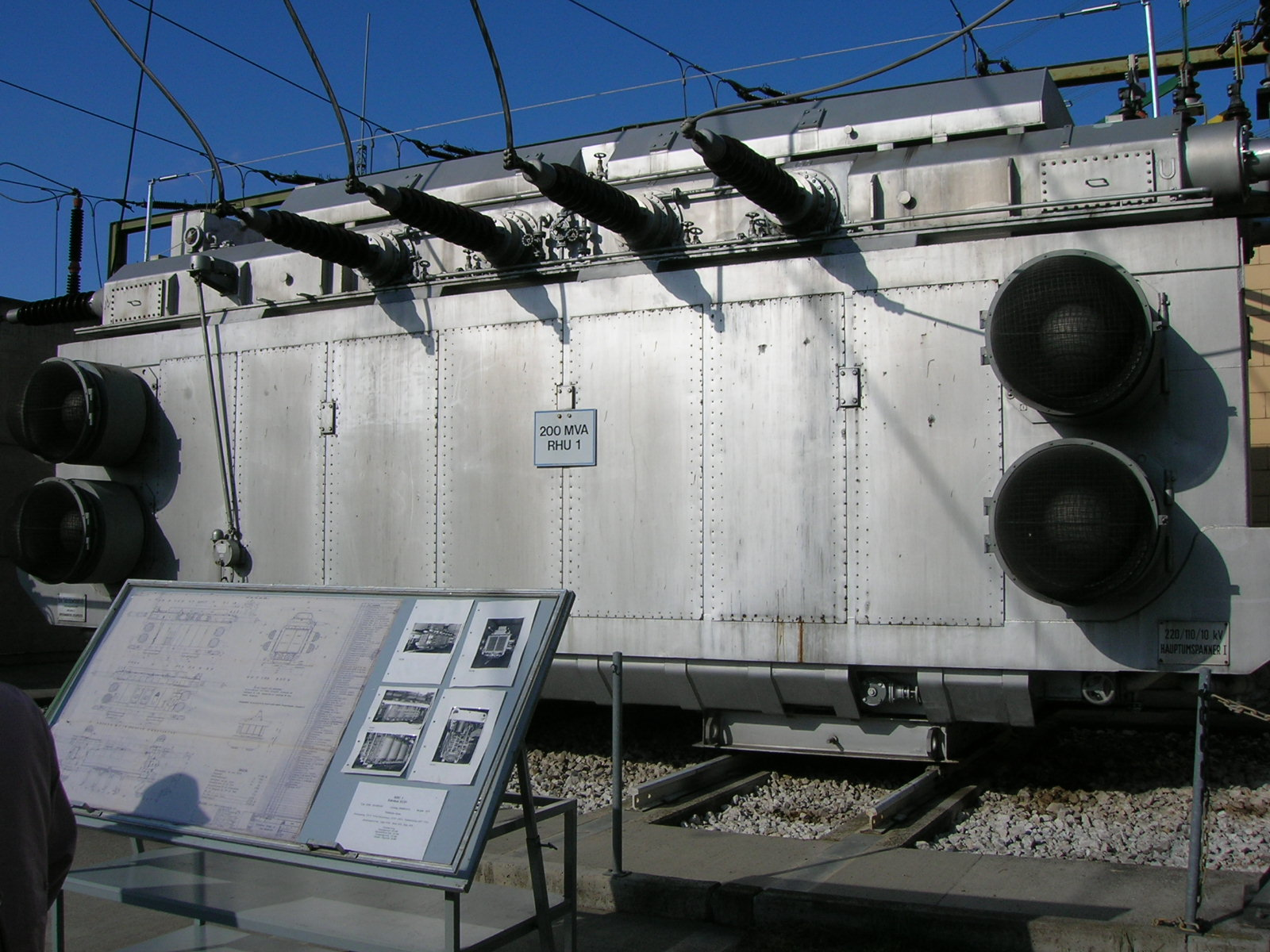 Transformator im Umspannwerk Bisamberg